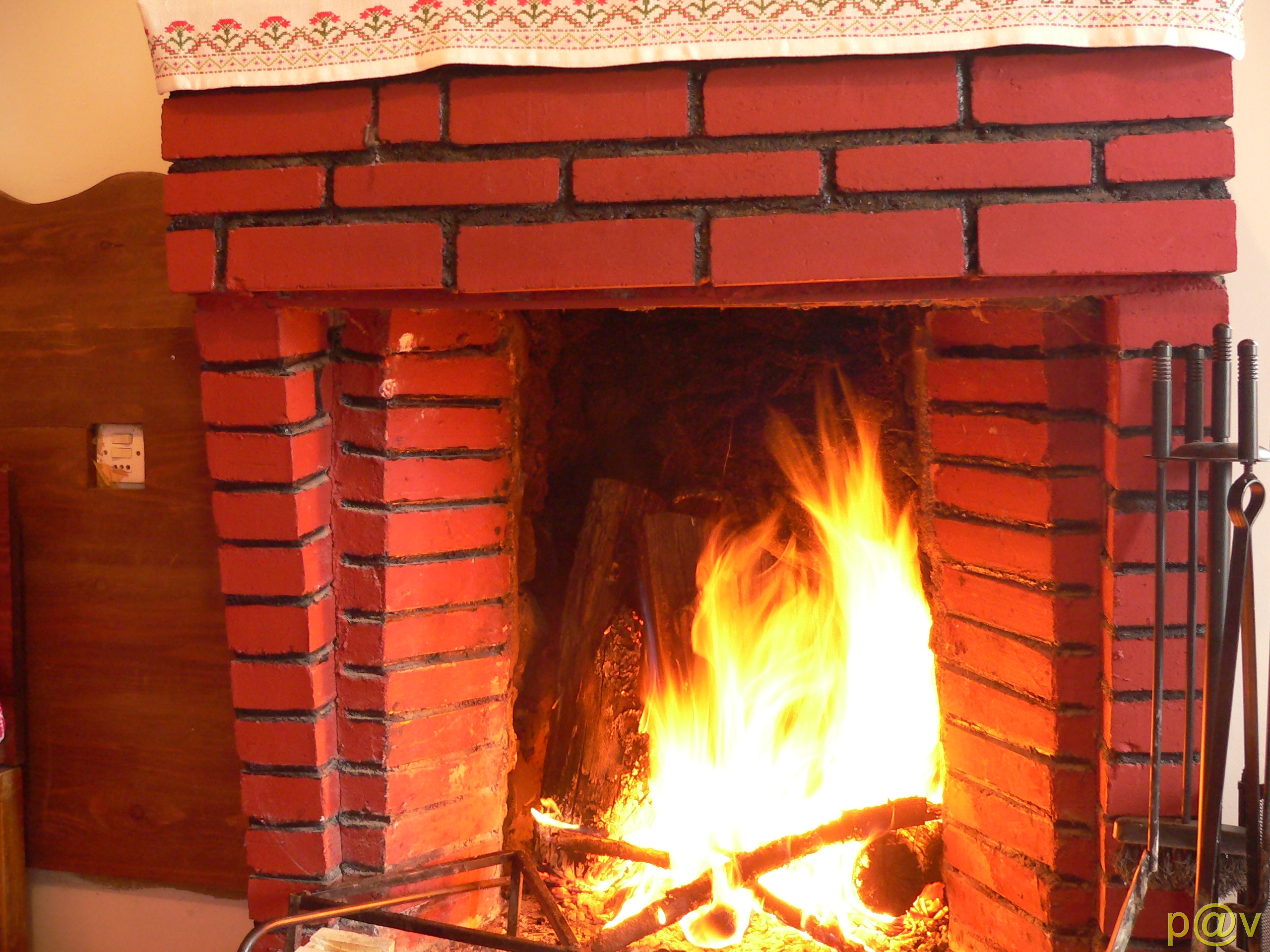 Τελος Απριλη τζακι